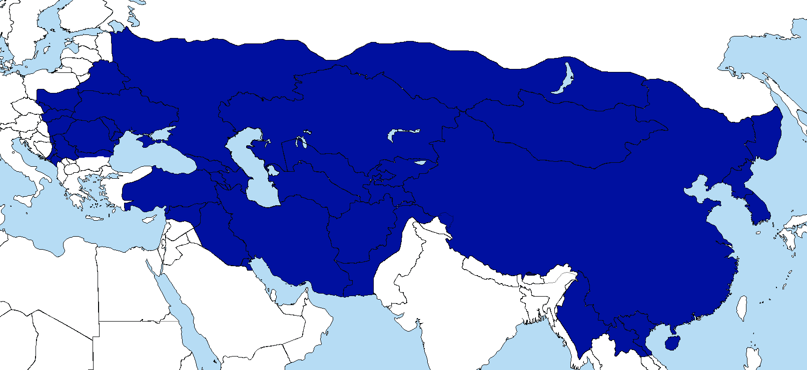 Moğol İmparatolruğun mevcut görselinden daha kaliteli bir görsel.